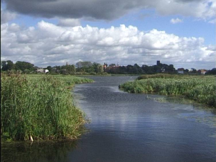 Ostoja ptactwa wodnego